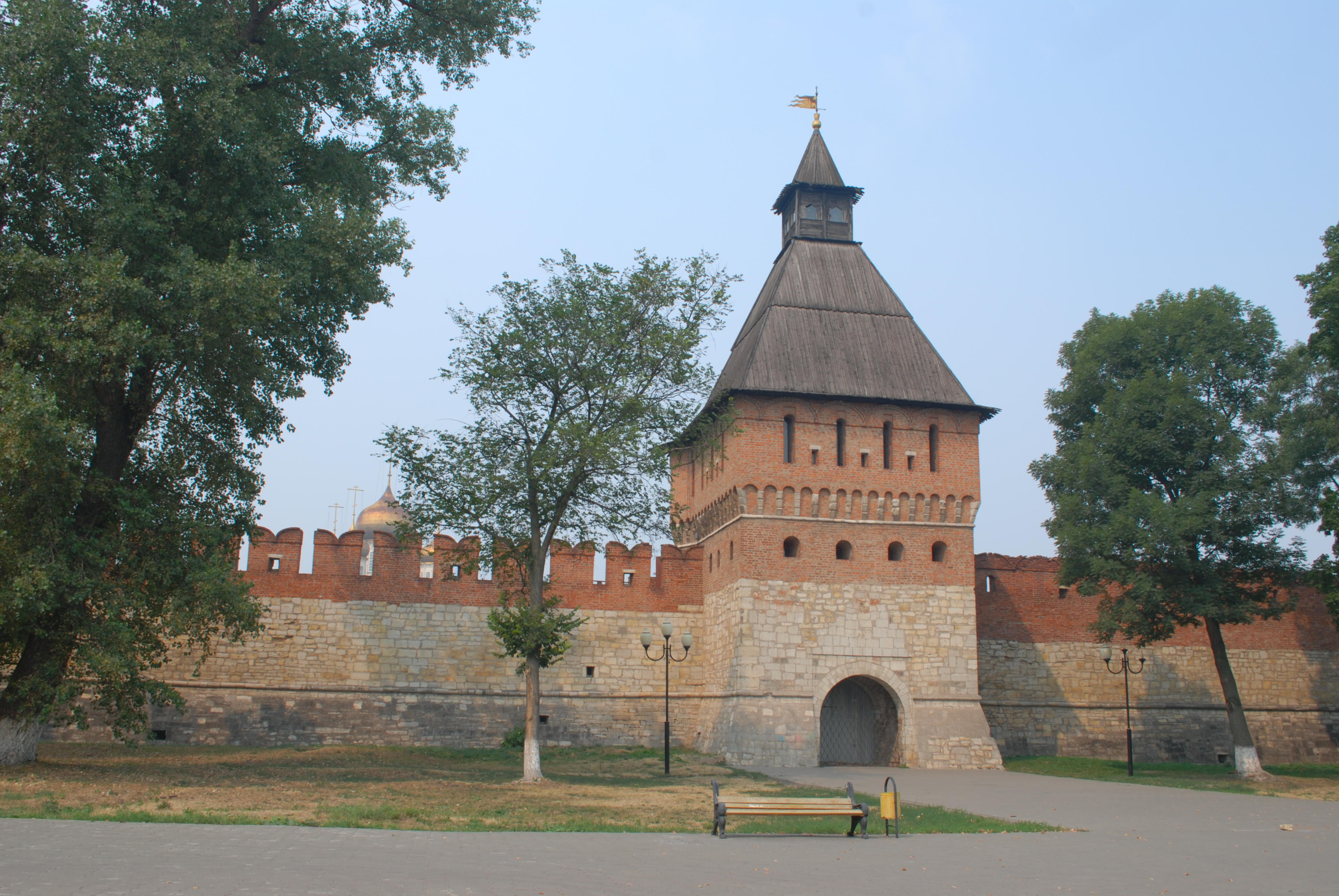 Ивановских ворот (Тульская область, Тула, Кремль)